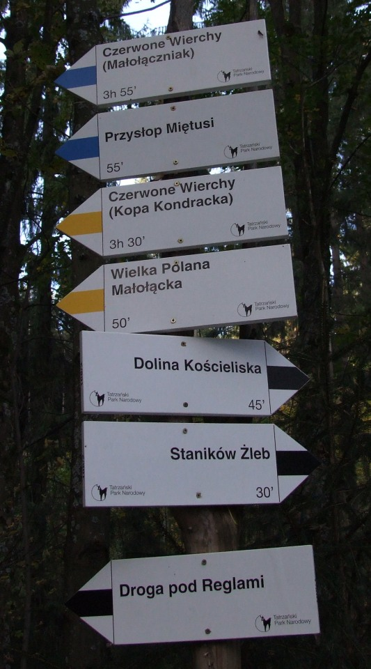 Tabliczki turyst. na rozdrożu Szatra w Dolinie Małej Łąki